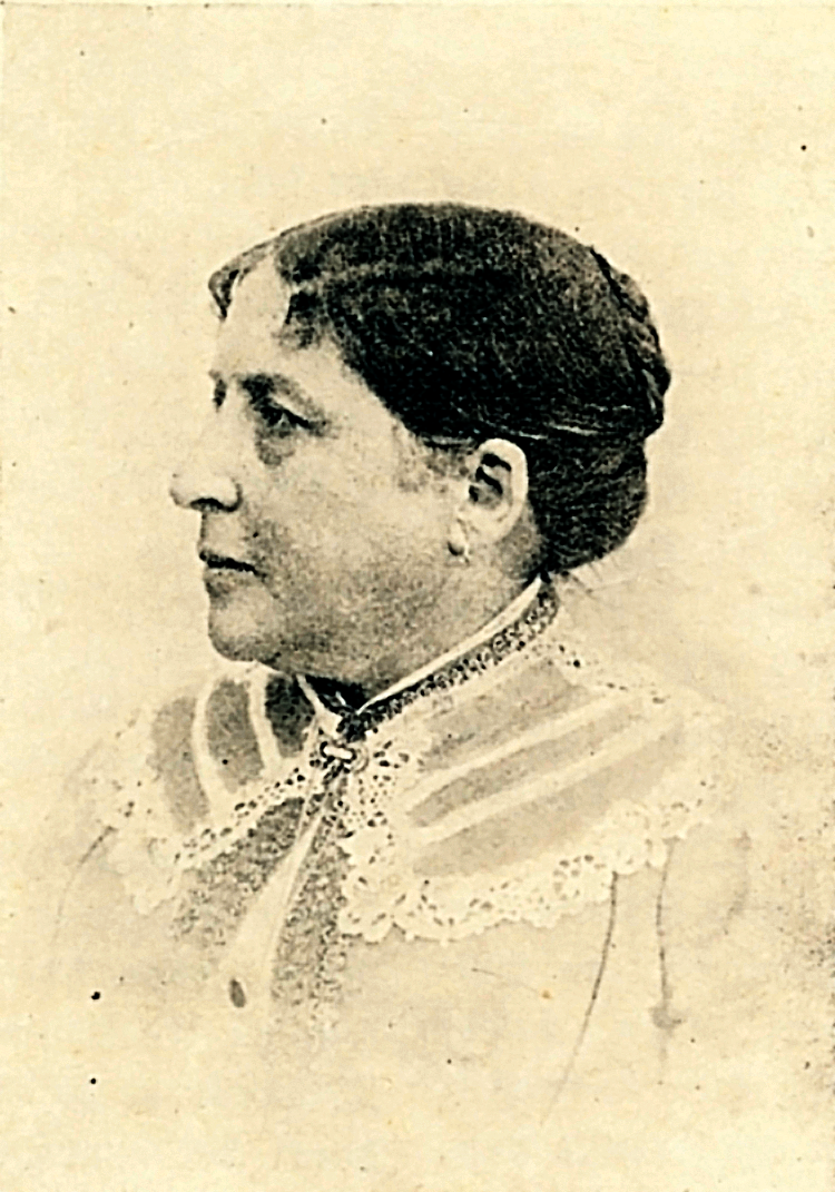 Portræt af forfatterinden Johanne Schjørring (1836-1906). Scannet fra ugebladet Folkelæsning nr. 42 - 15.07.1906 fra en artikel i forbindelse med forfatterindens 70 års fødselsdag.